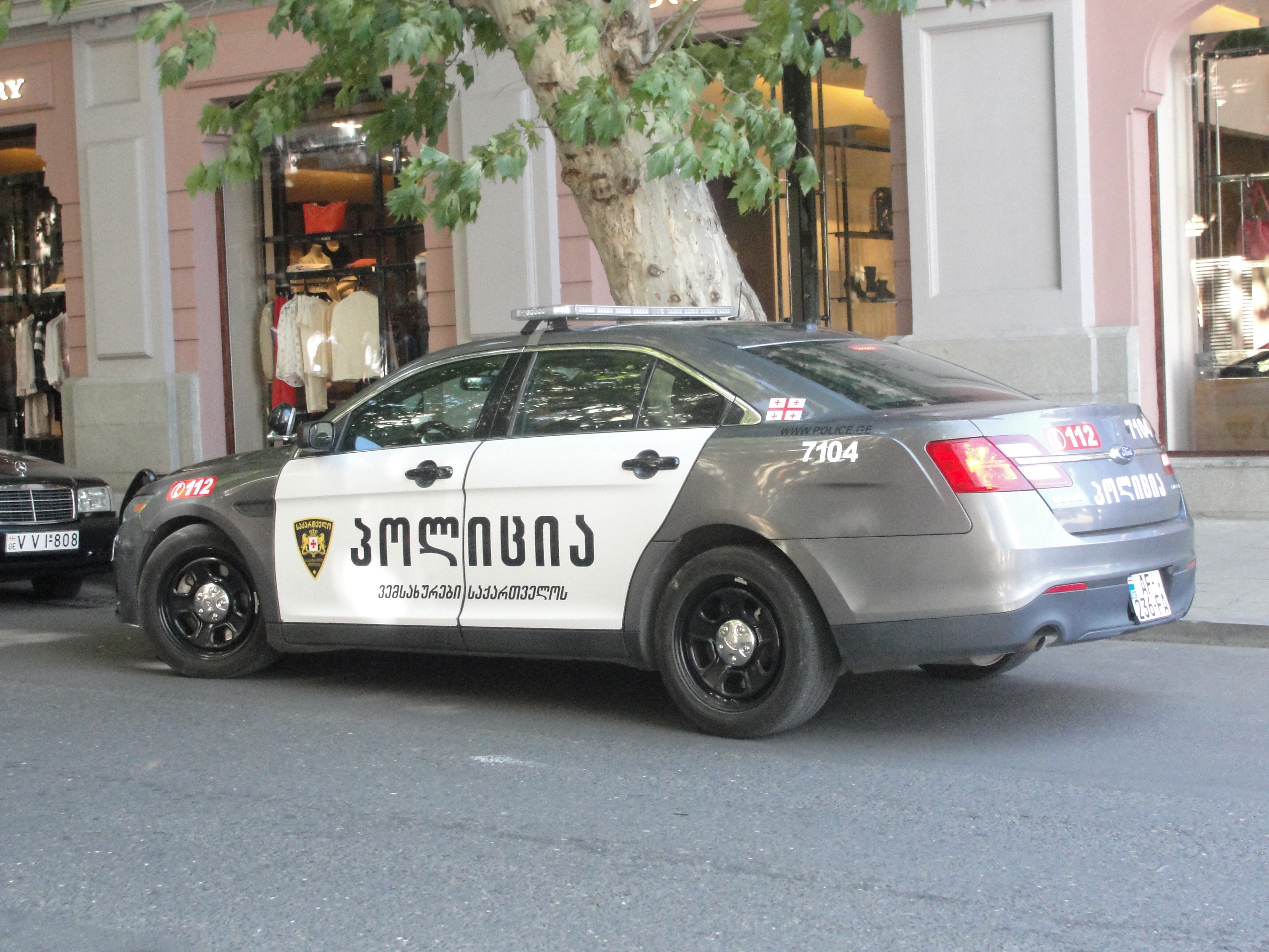 Police car in Tbilisi